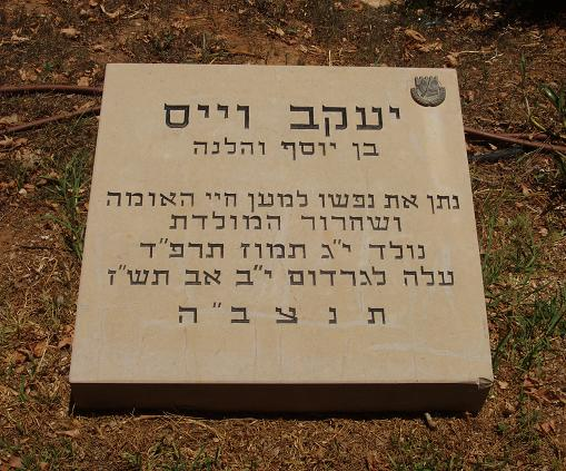 המצבה המקורית על קברו של יעקב וייס, כיום בשוני. צילם דוד שי